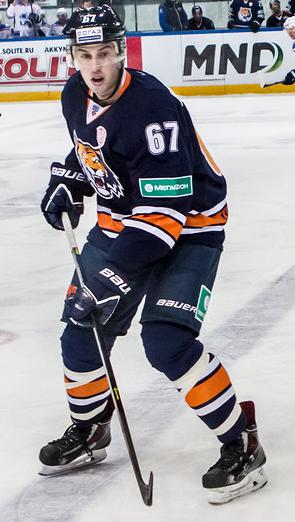 Нападающий хабаровского «Амура» Антон Крысанов во время матча чемпионата КХЛ против тольяттинской «Лады» 10 декабря 2014 года.